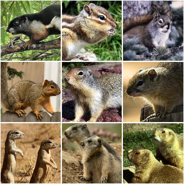 Membres de la famille des Suridés